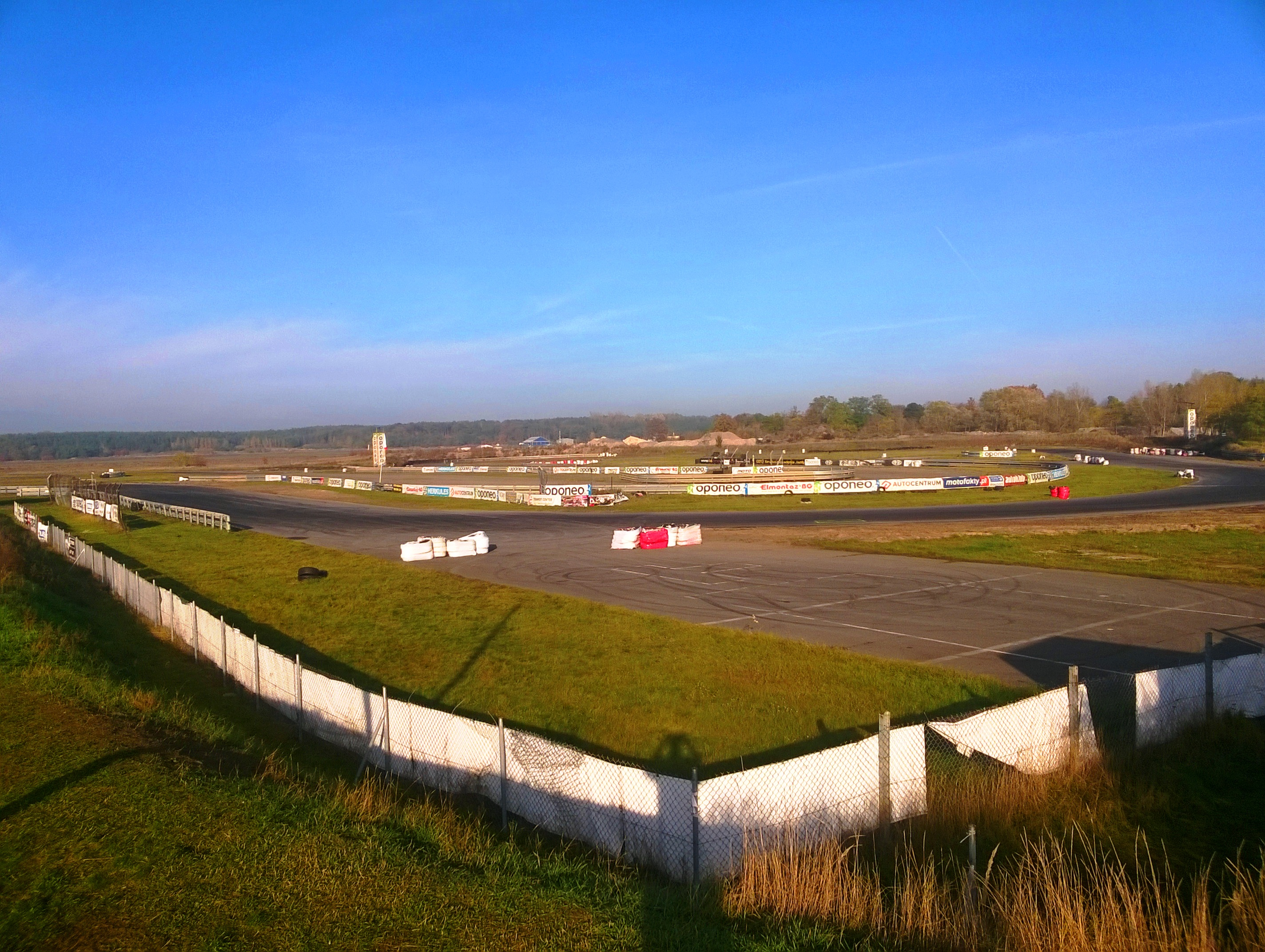 MotoPark Toruń